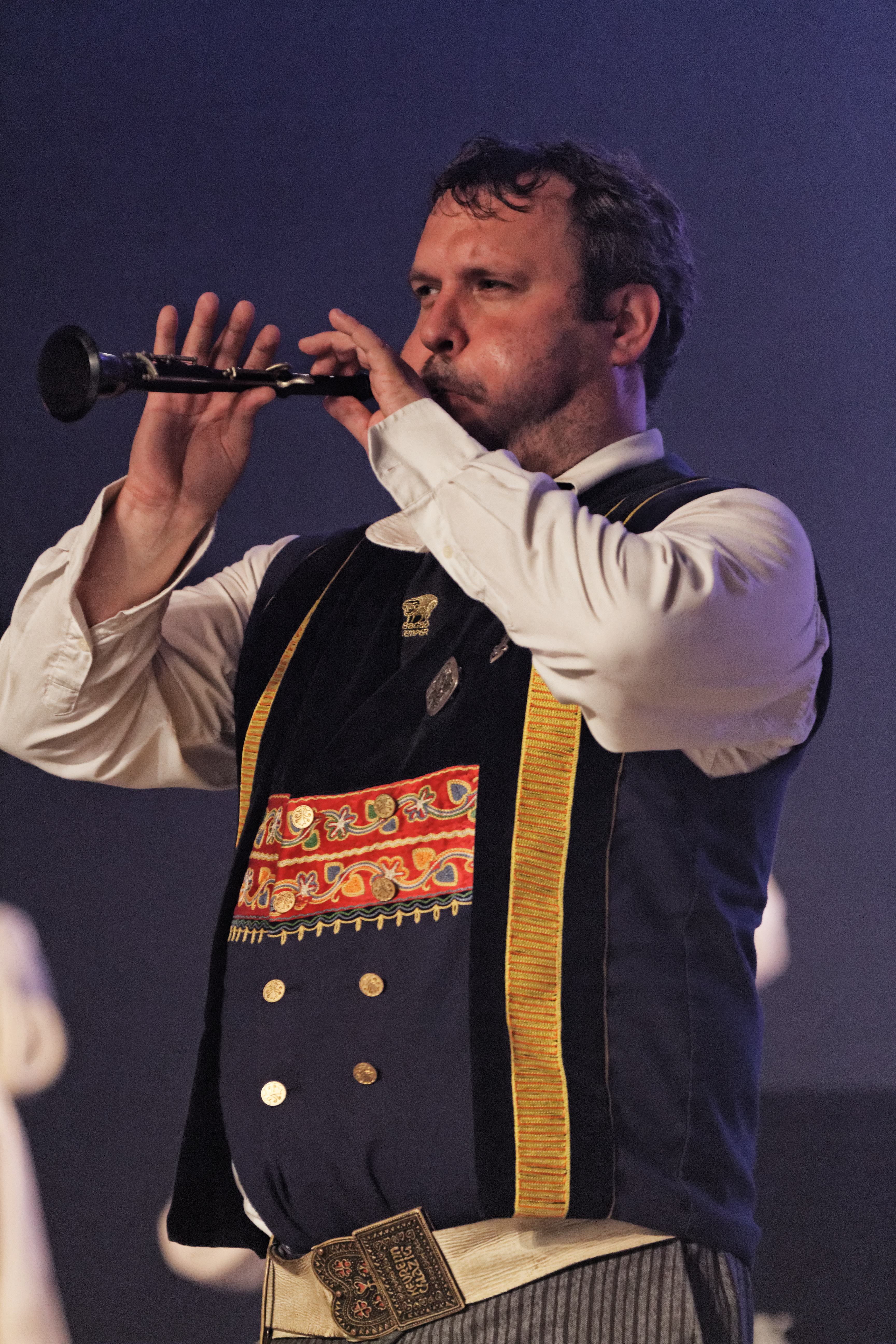 Steven Bodénès, penn-soner du bagad Keper lors d'un concert de Dan ar Braz sur la scène Gradlon lors du festival de Cornouaille 2013.